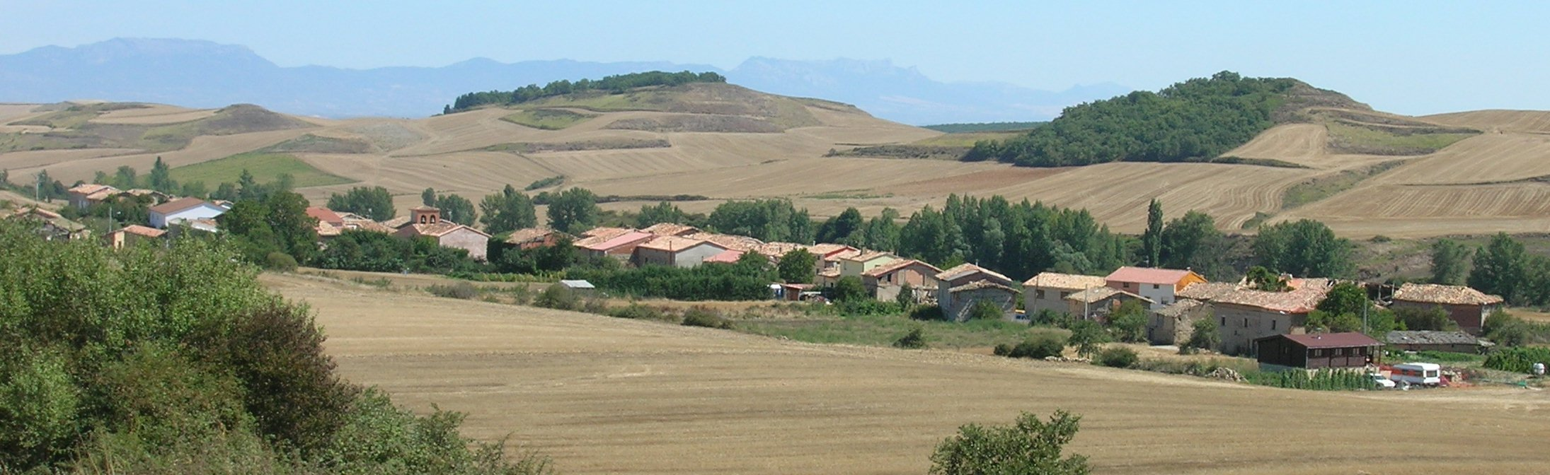 San Pedro del Monte visto desde el SurOeste